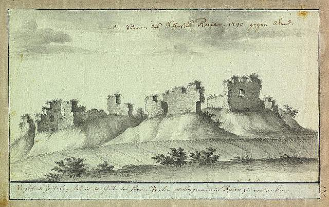 Scan from Johann Christoph Brotze's book Sammlung verschiedner Liefländischer Monumente. Die Ruinen des Schlosses Ruien. 1790. gegen Abend [G. Bergmann; die Ansicht].